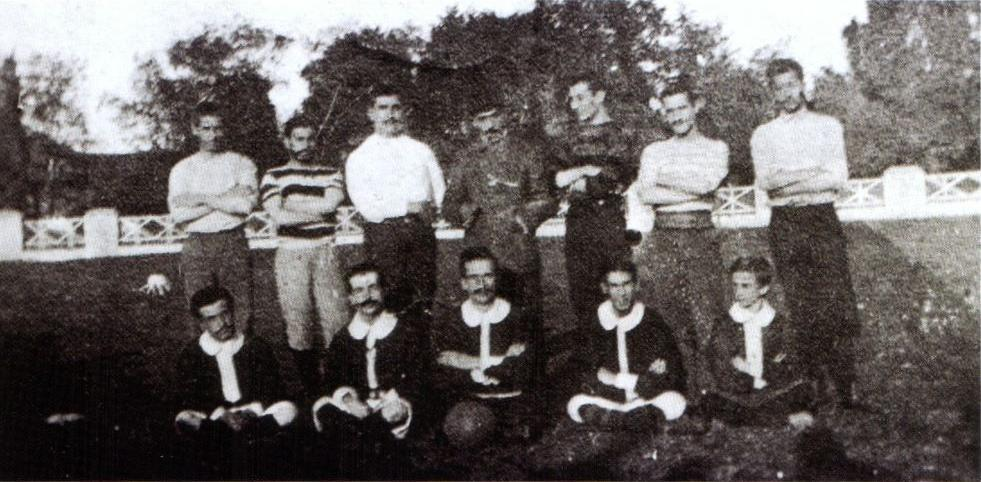 Black Stockings FC oyuncularına ait olduğu öne sürülen bir fotoğraf.